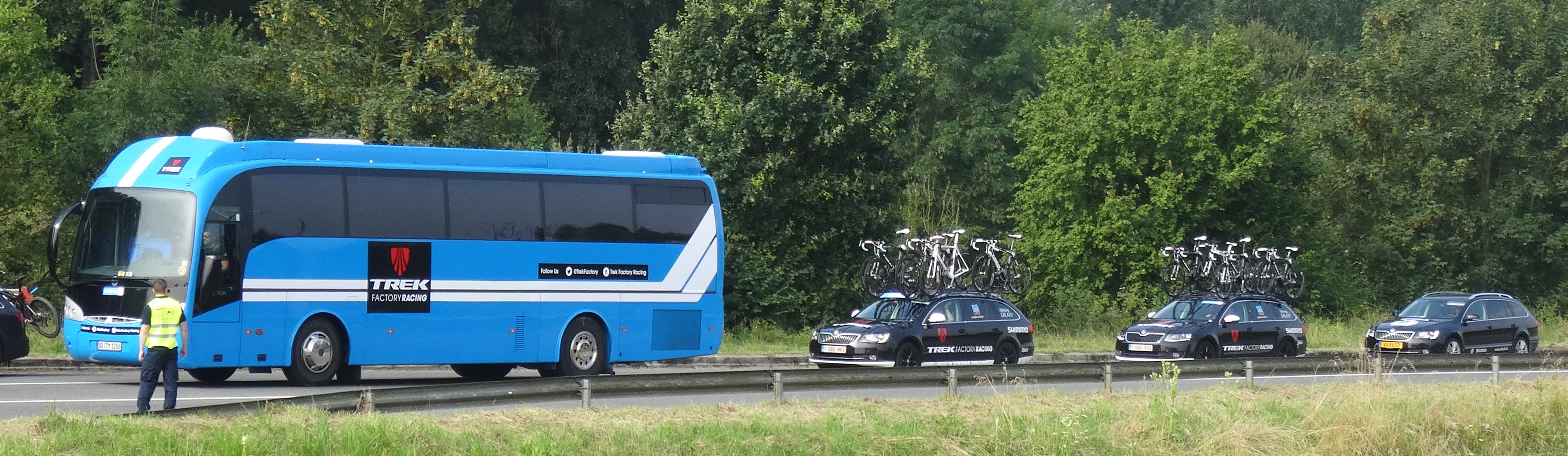 Reportage photographique réalisé le dimanche 27 juillet à l'occasion du départ de la deuxième étape du Tour de Wallonie 2014 à Péronnes-lez-Antoing (Antoing), Belgique.